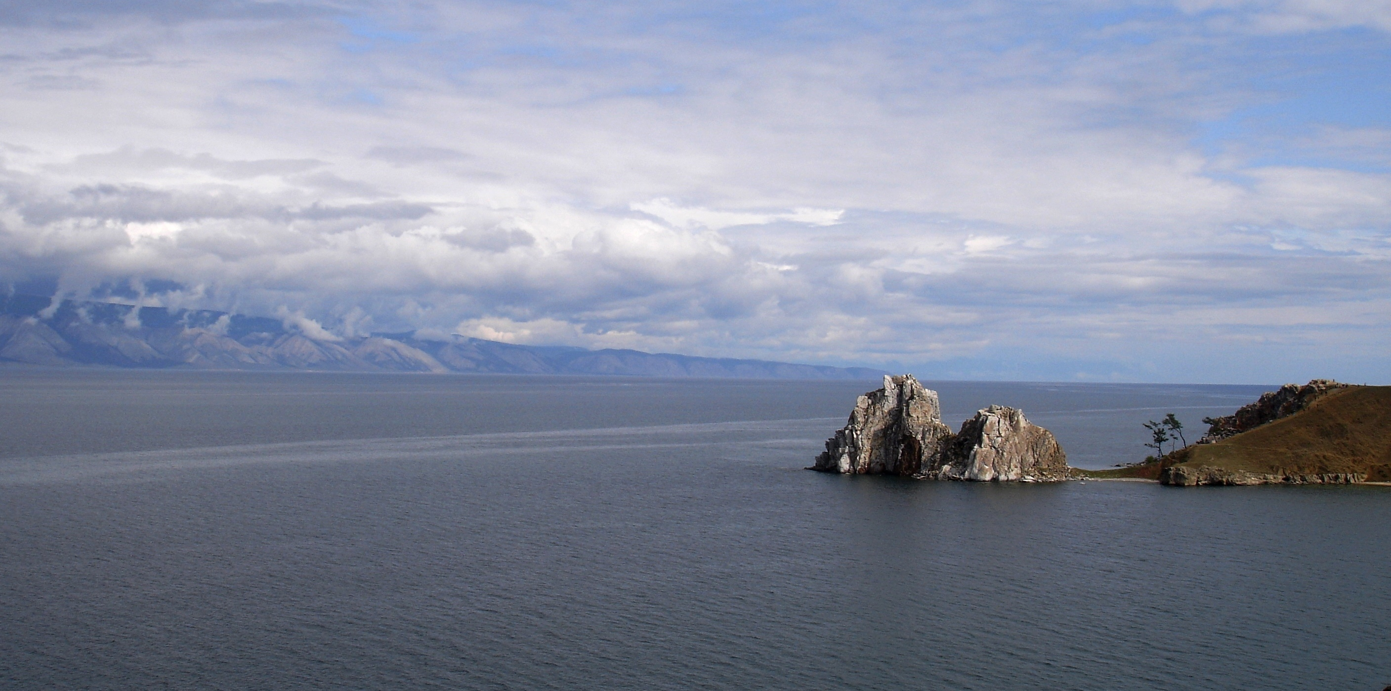 Мыс Бурхан (Скала Шаманка), Ольхонский район This image is related to the protected area of Russia number 3810274